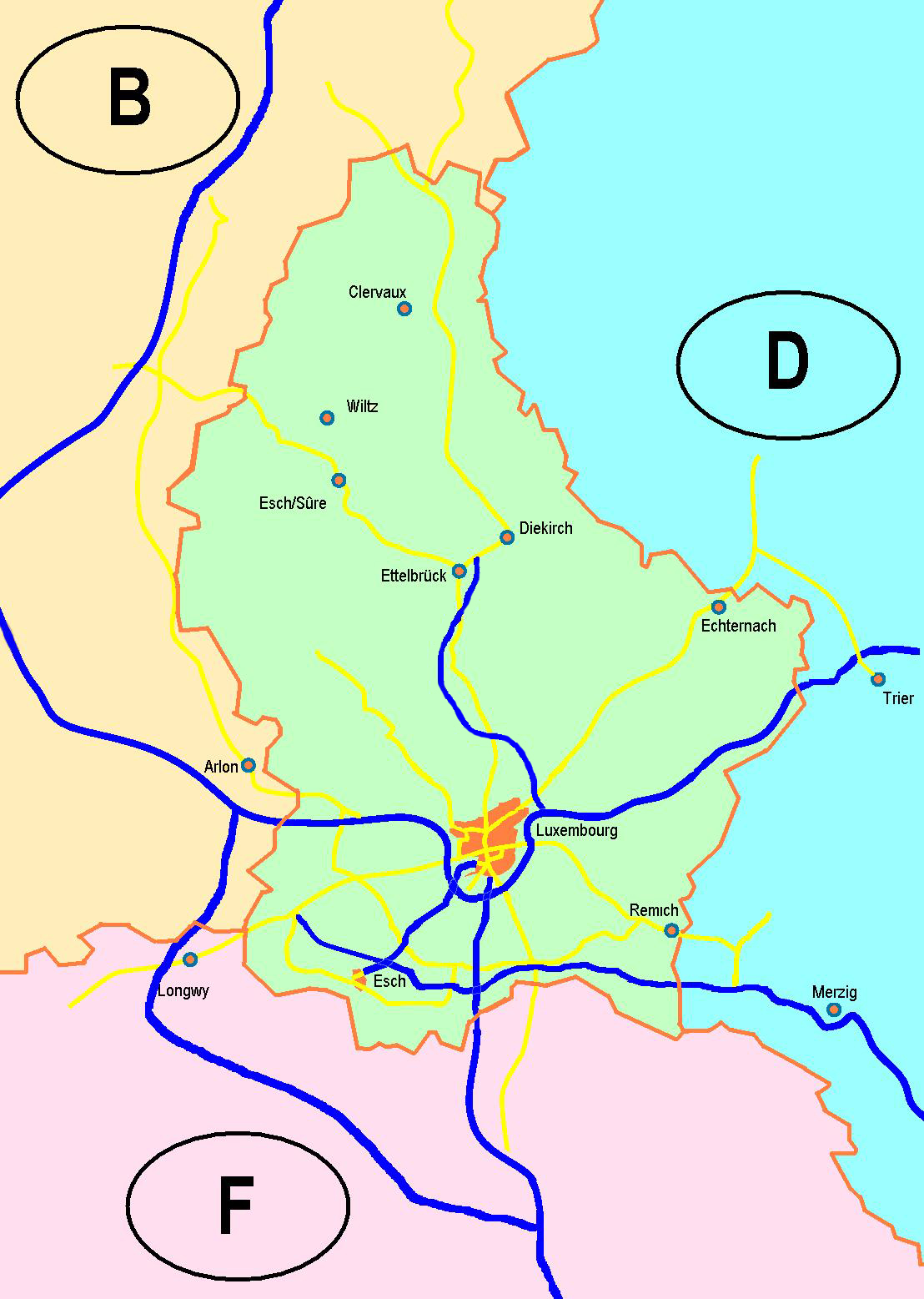 A Luxemburgi Nagyhercegség autópályái.